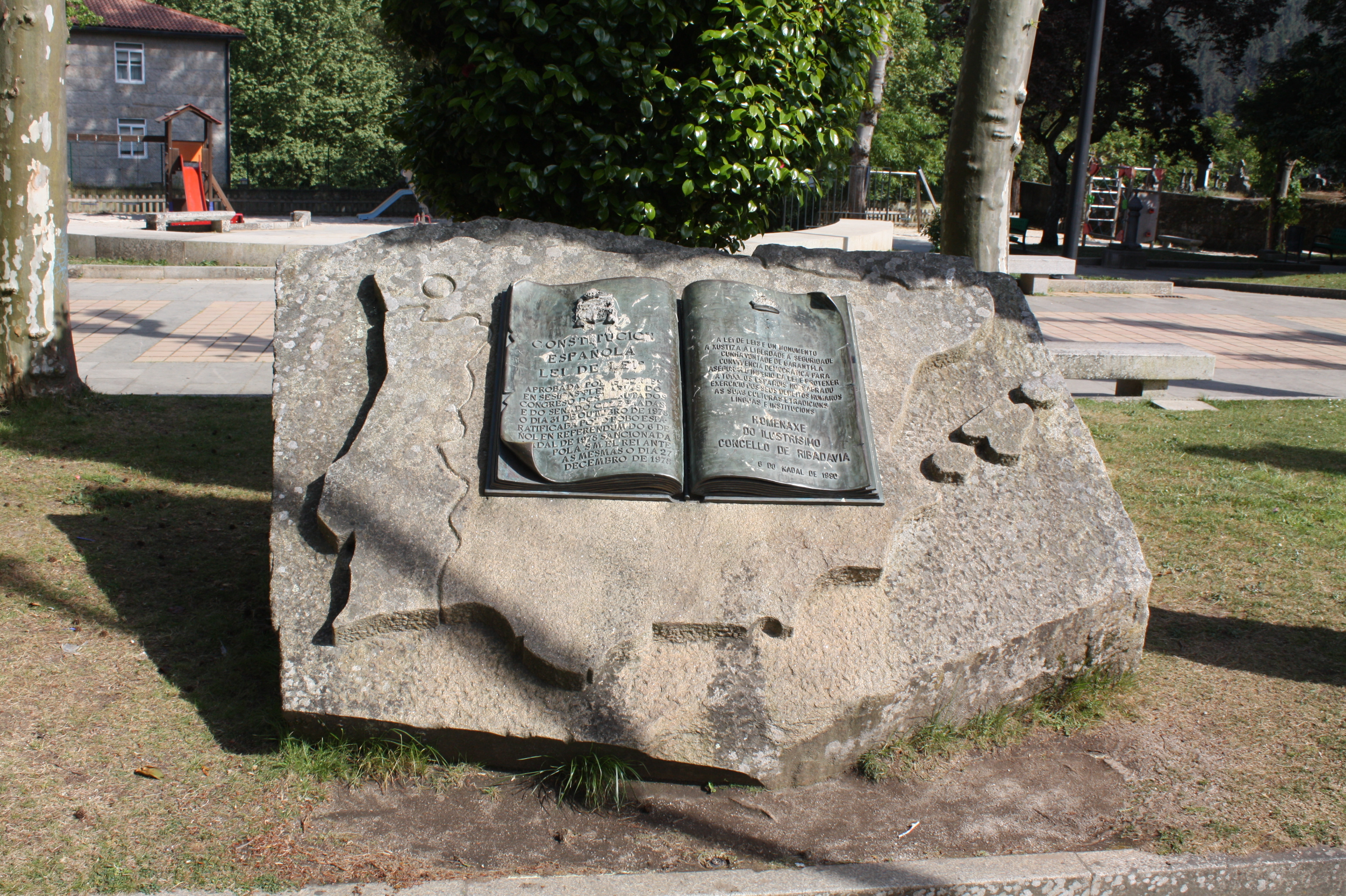 Monumento (vandalizado) en homenaxe á Constitución española (1990), no parque de Ribadavia.